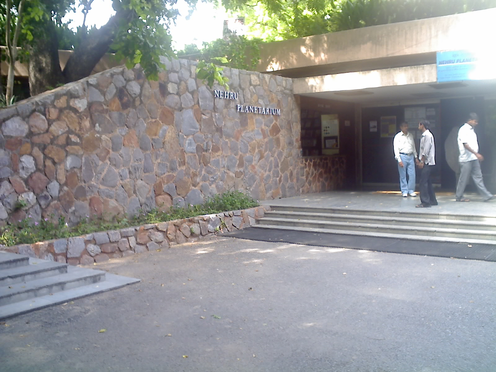 तारामंडल का द्वार